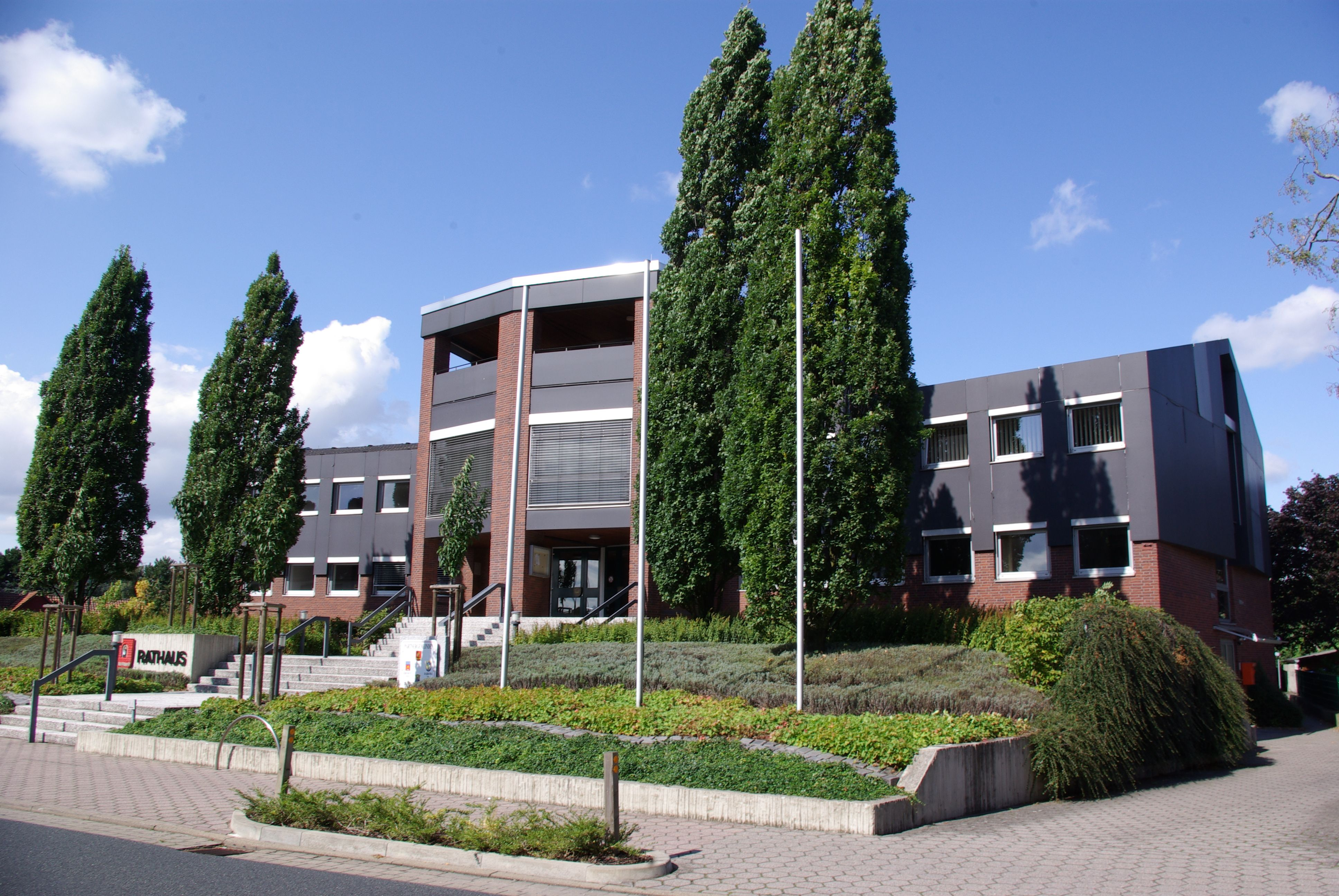 Lengede, Niedersachsen, Deutschland. Das Rathaus in Lengede.